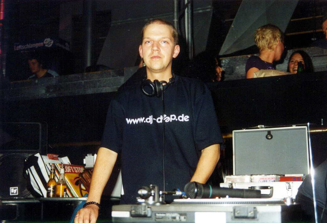 Andreas Peine, aufgenommen im September 2011